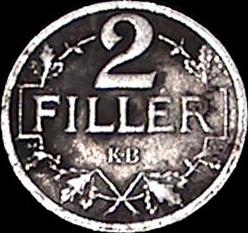 2 fillér 1917 - reverse